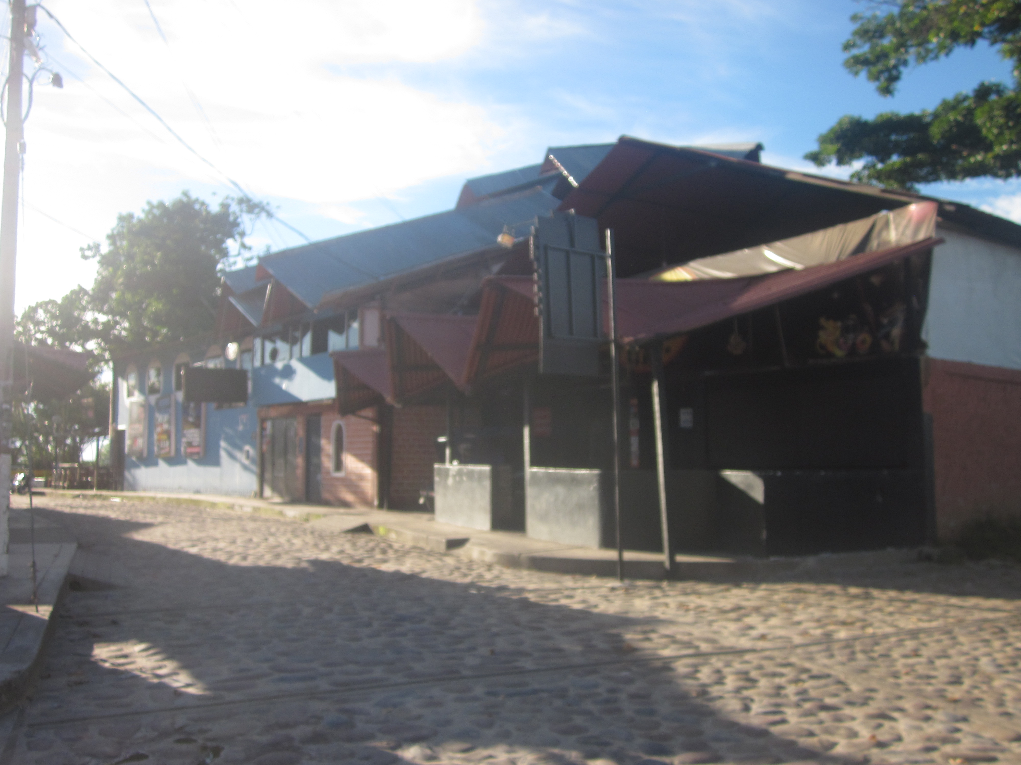 Boulebard 110 y el padrino